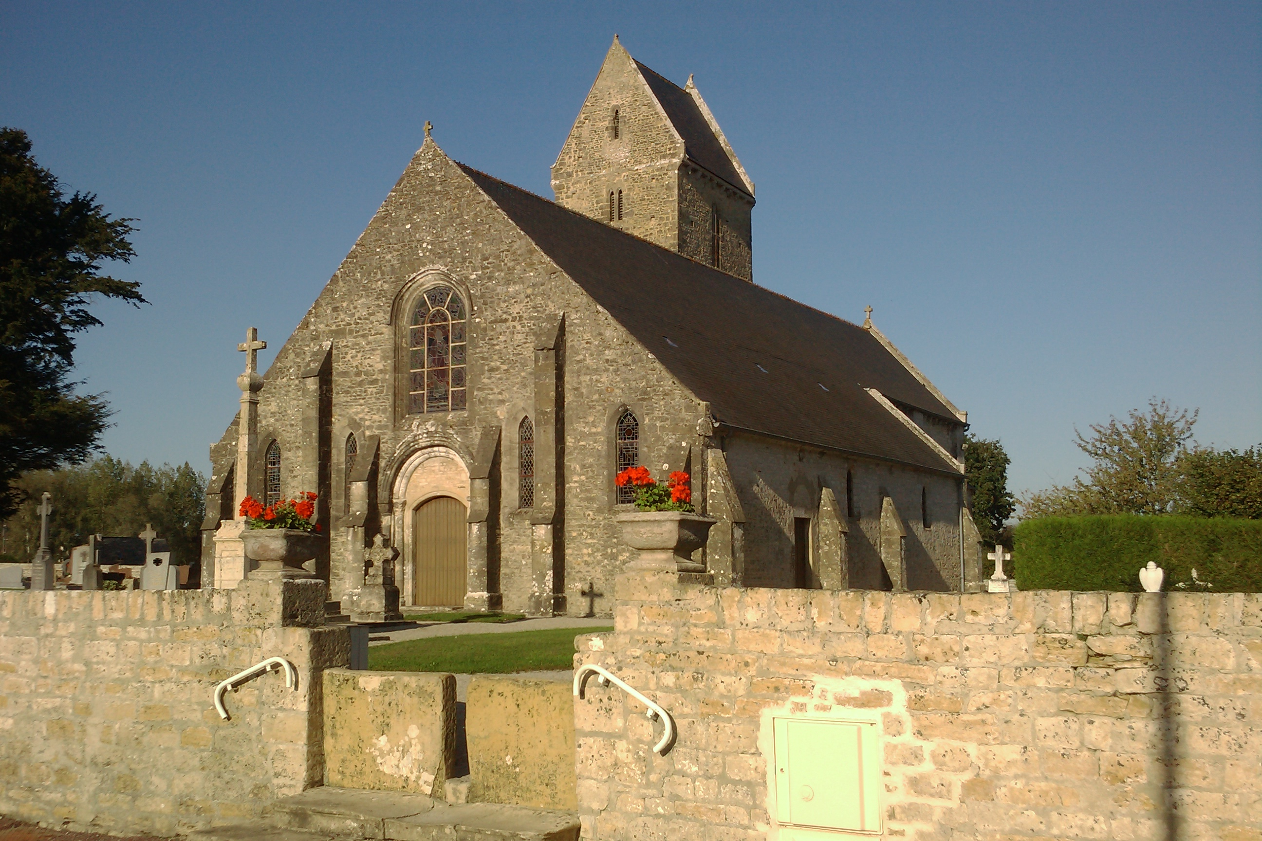 Église Sainte-Colombe-en-Cotentin, ancien nom de Chef-du-Pont .